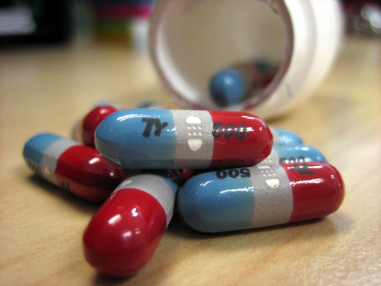 Tylenol rapid release pills